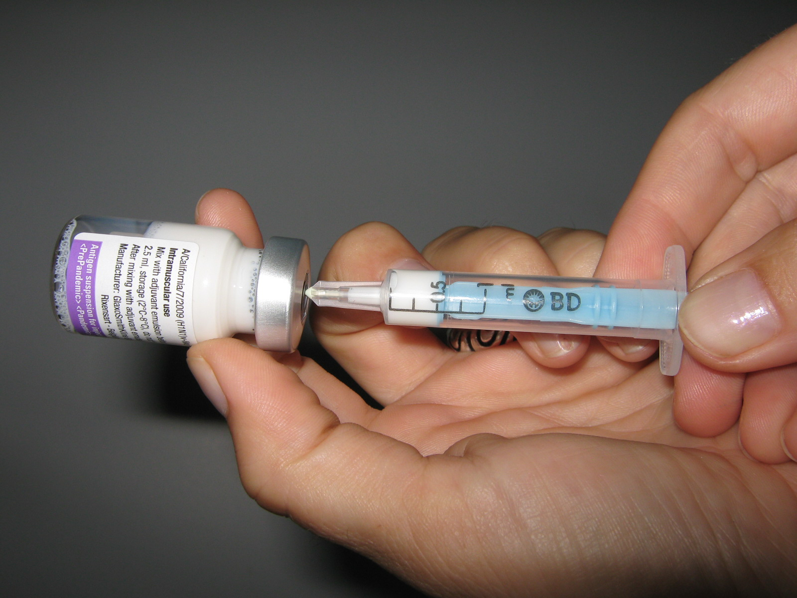 Vaccin contre la grippe A (H1N1) de 2009 Pandemrix, de GlaxoSmithKline Biologicals S.A.